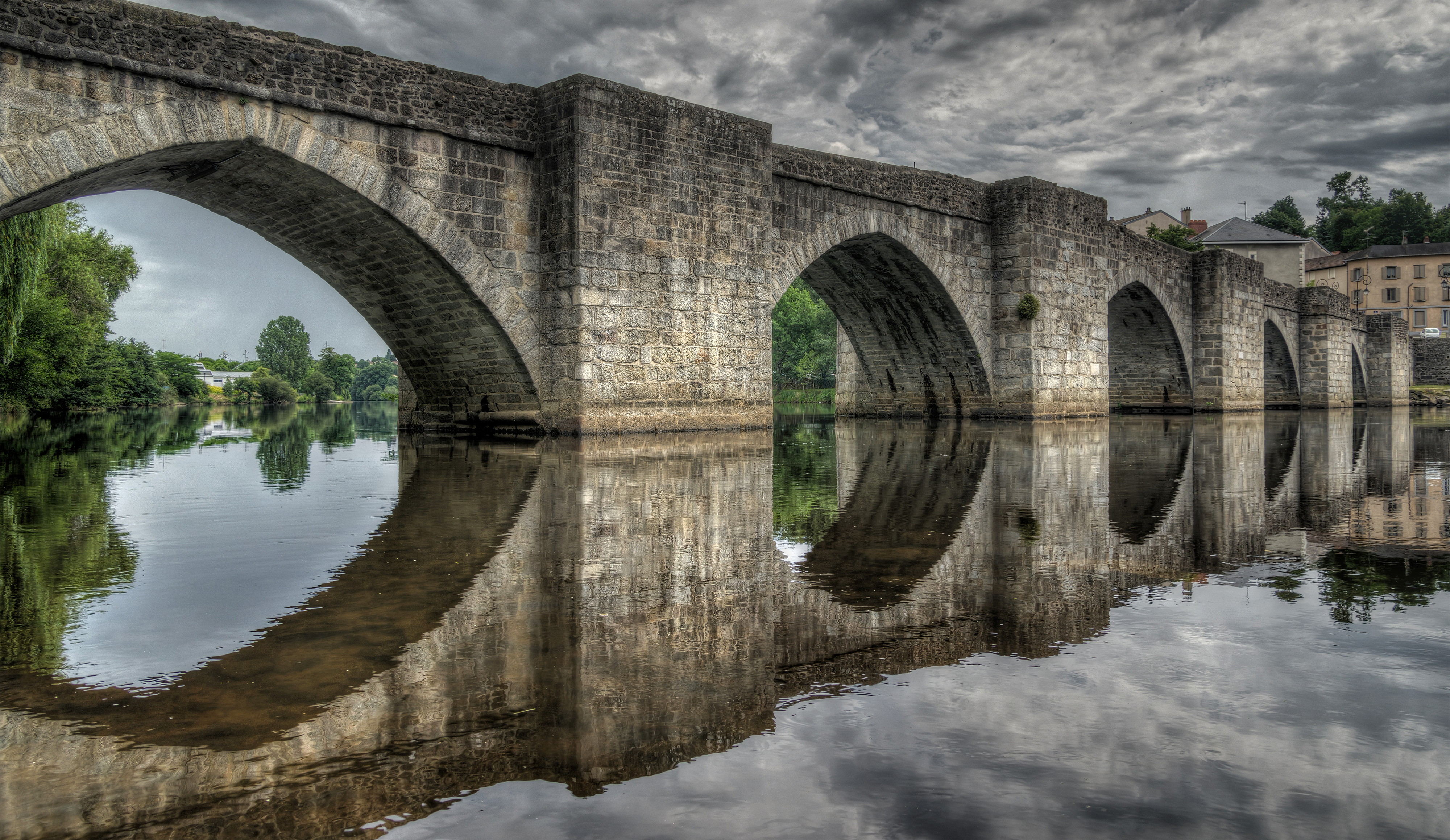 Pont Saint-Étienne, Limoges .